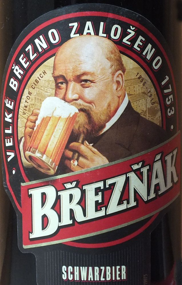 Viktor Cibich auf dem Etikett einer Březňák-Schwarzbierflasche